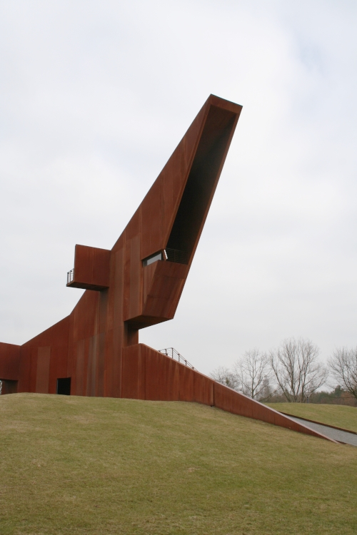 Lëtzebuerger Tuerm zu Tréier (Mäerz 2006)